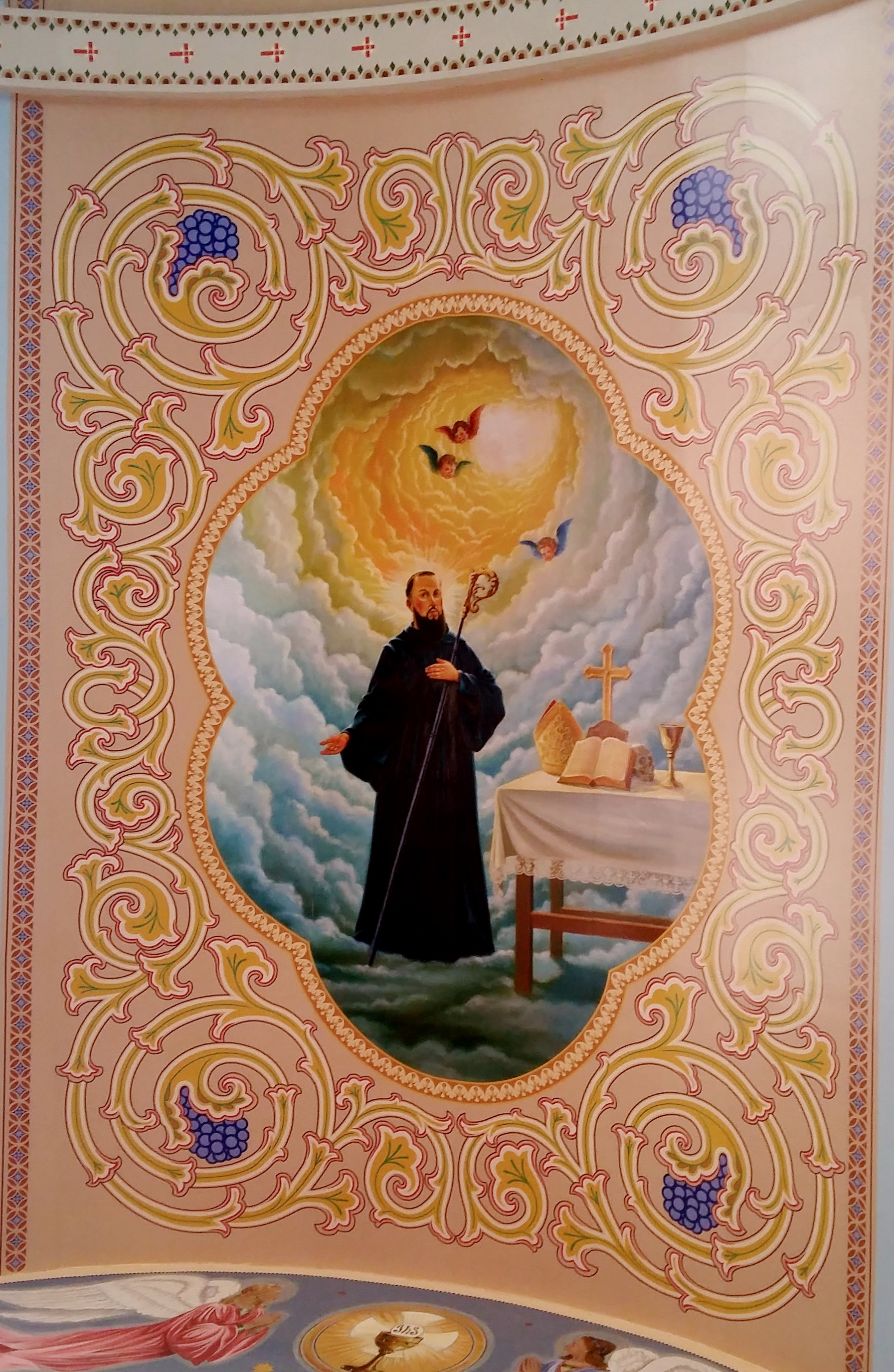 Pintura que fica no no fim do teto que cobre o corredor principal da Catedral, próximo ao altar, em São Paulo (SP), Brasil.